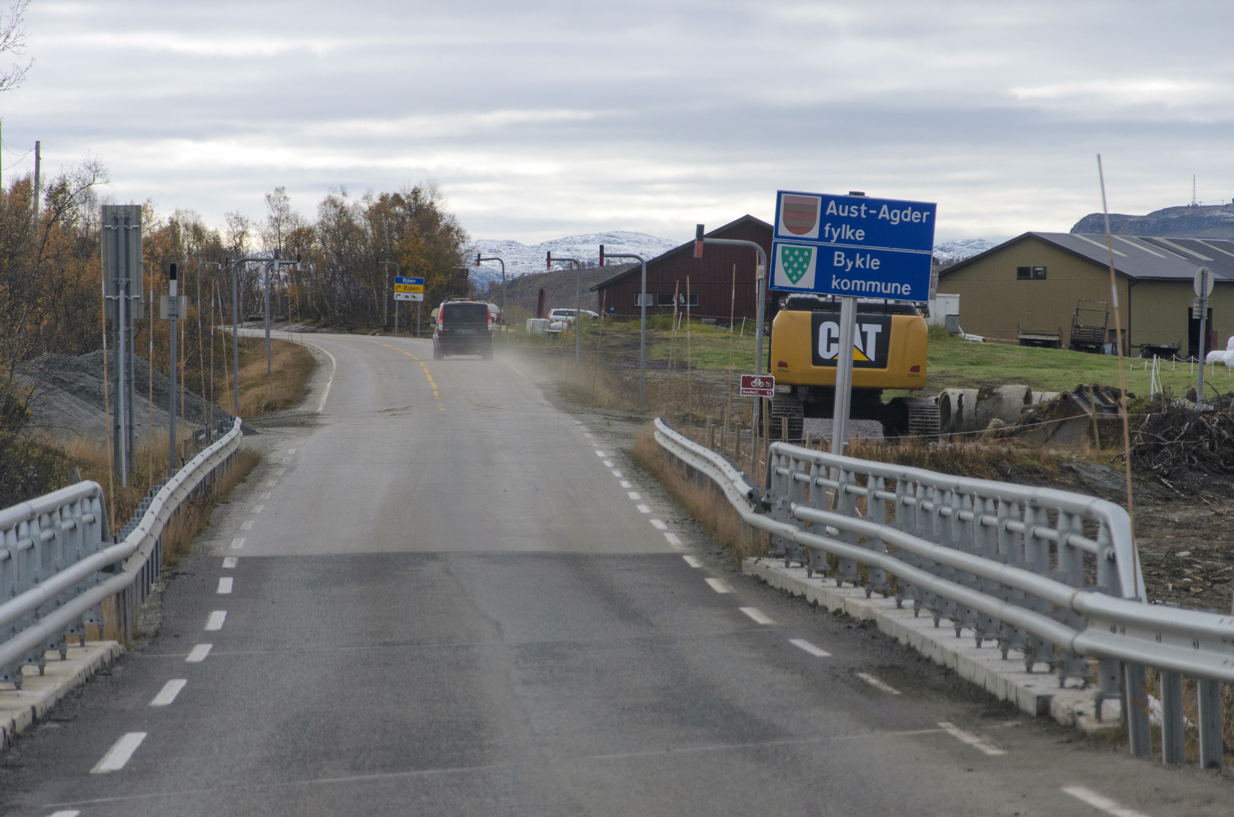 Riksvei 9 ved fylkesgrensa mellom Telemark og Aust-Agder